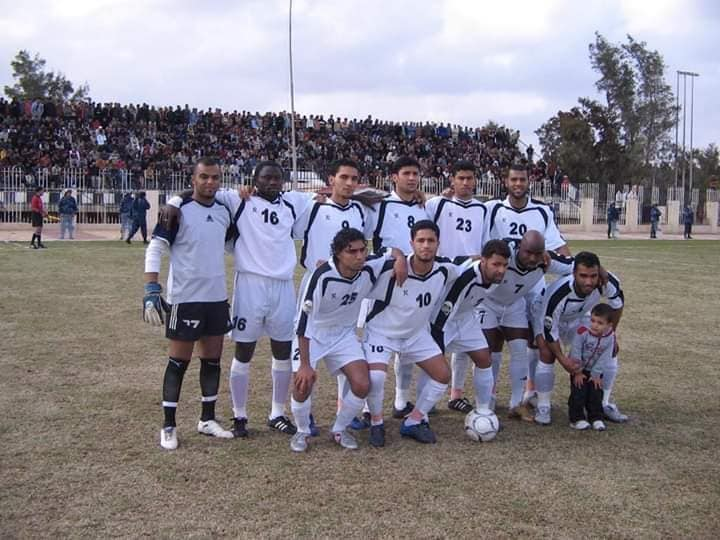 الفريق الأول لنادي المستقبل بالجميل موسم 2005-2006